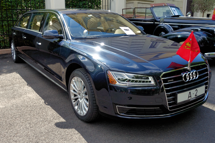 Kongens A-2